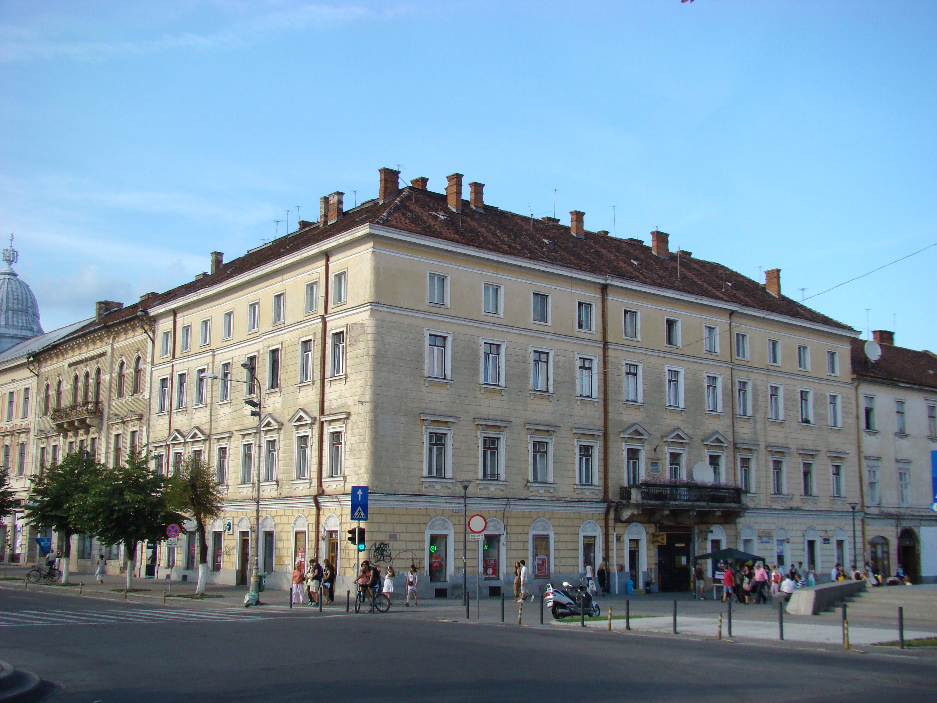 Clădire monument istoric: Casa Teleki